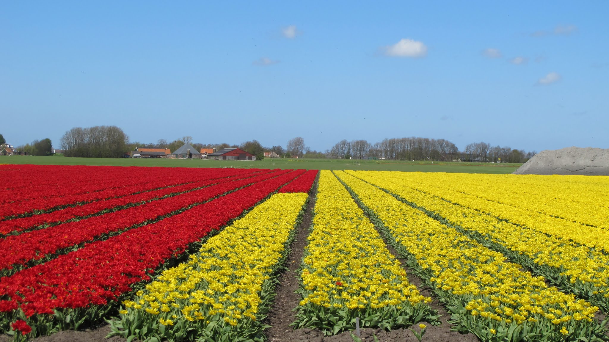 Broek op Langedijk, Netherlands